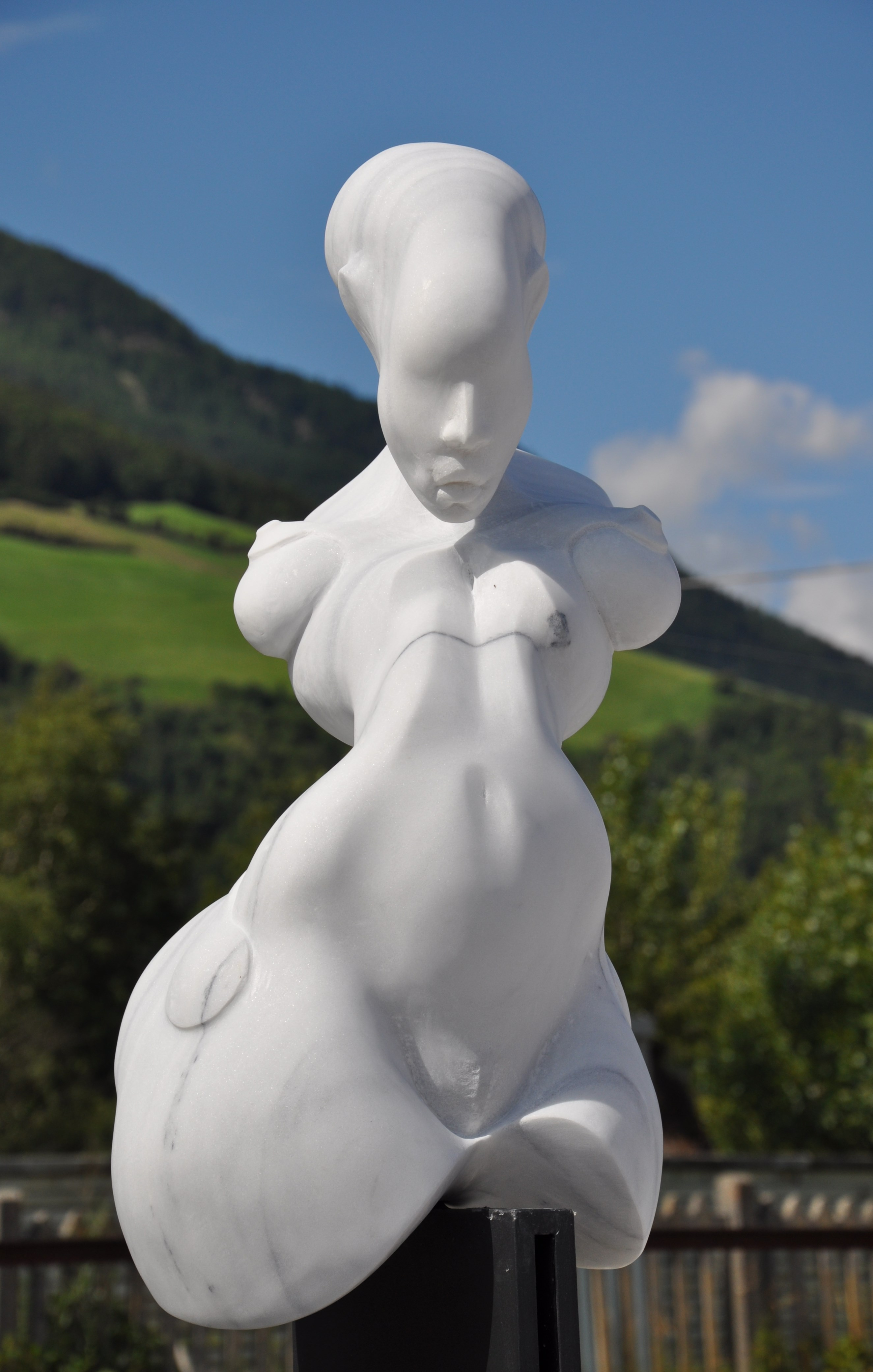 Peter Brauchle, marple, 2014